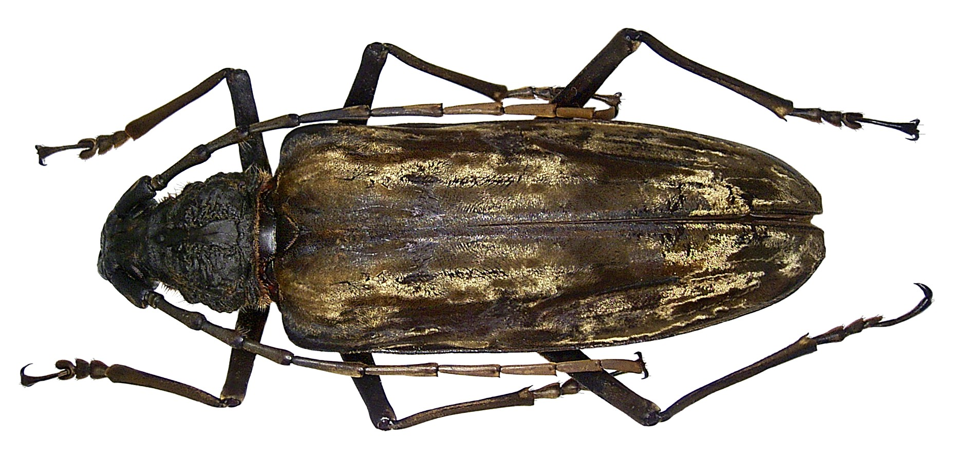 Familie: Cerambycidae Grösse: 81 mm Fundort: Indonesien, Sumatra leg. 2006; det. A.Weigel, 2007 Foto: U.Schmidt, 2008